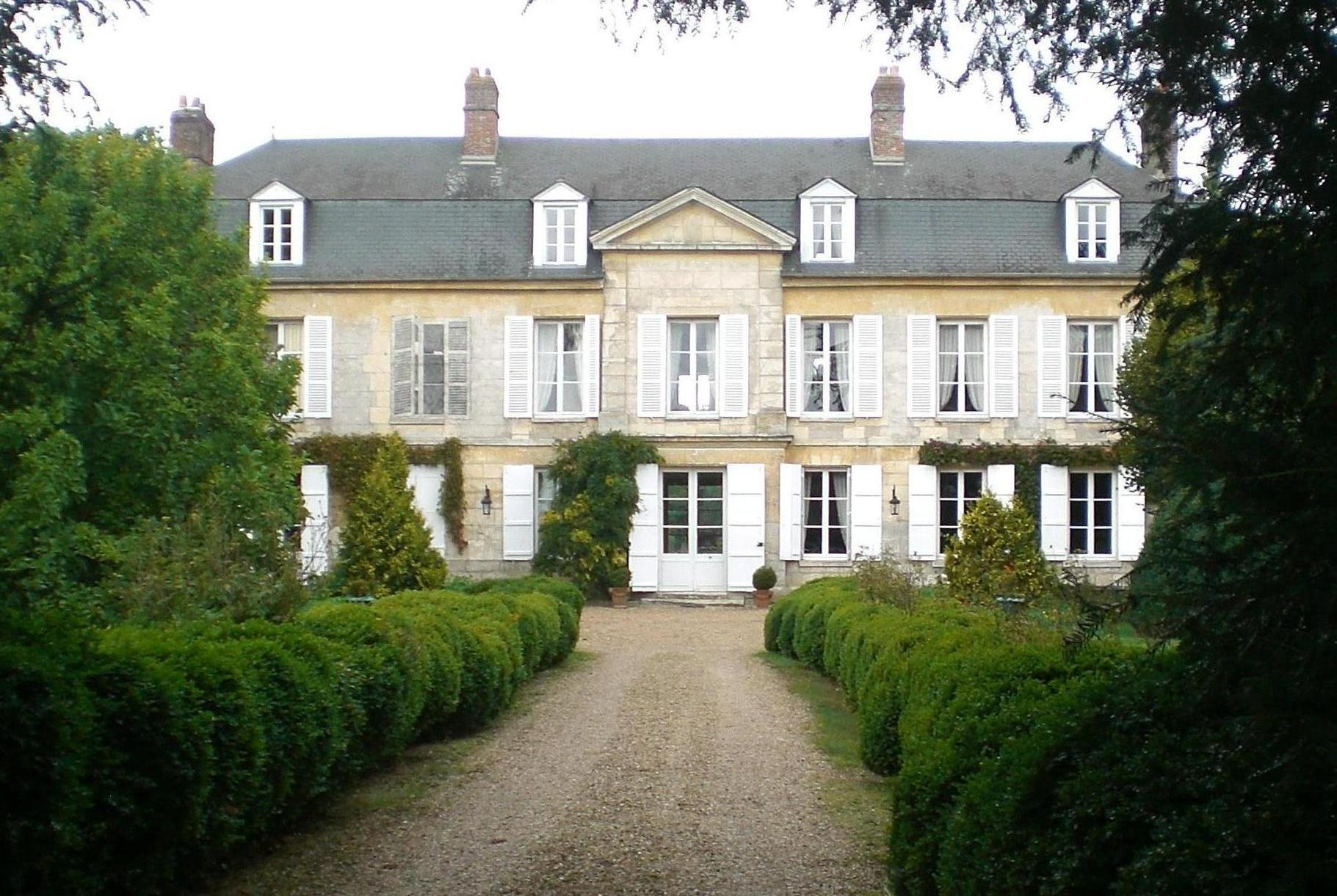 chateau du XVIIe , XVIIIe monument historique à Anserville oise france